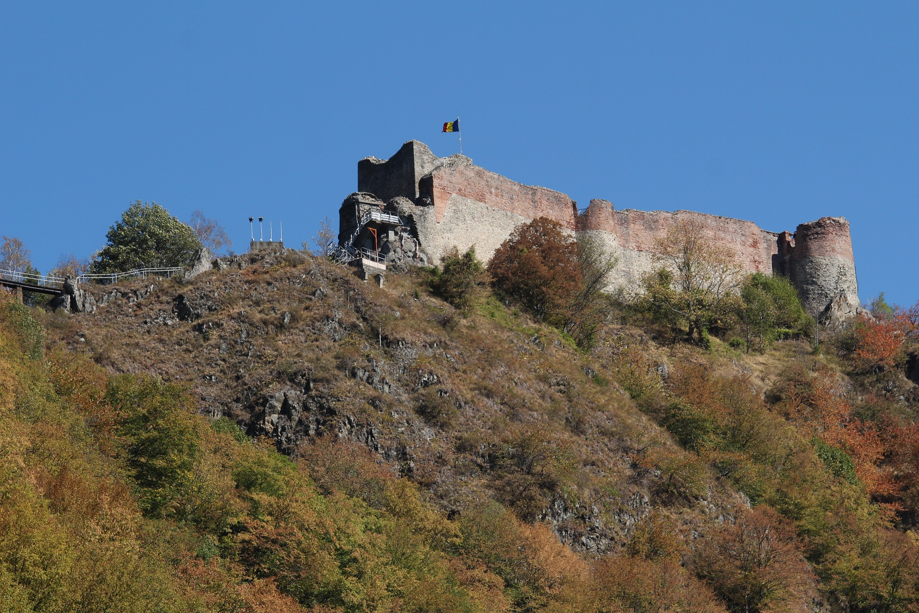 Ansamblul Cetății Poenari